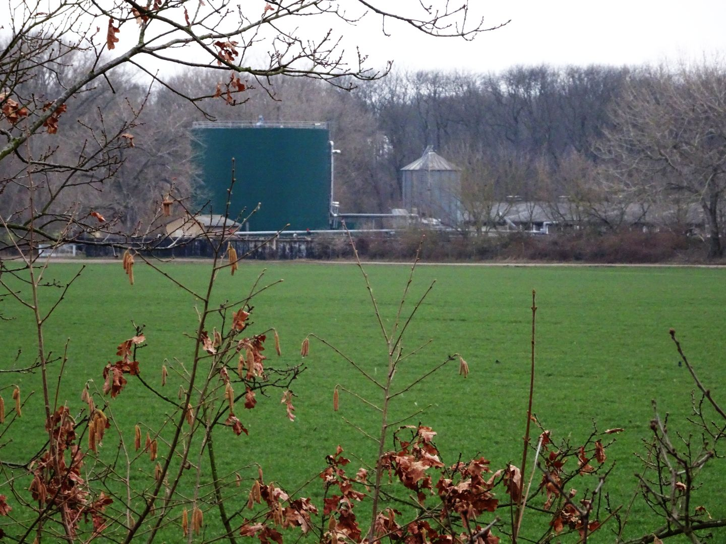 Gundorfer Agrargenossenschaft e.G.